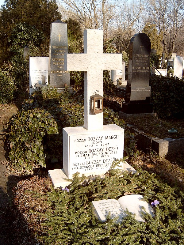 Bozzay Dezső (Répceszentgyörgy, 1912. május 23. – Budapest, 1974. november 21.) ipari formatervező, építő-iparművész és Bozzay Margit (Szül: Horváth; Férj.: Bozzay Boldizsárné) (Kemenesszentpéter, 1893. január 3. – Budapest, 1942. március 17.) író sírja Budapesten. Kerepesi temető: 34-2-19